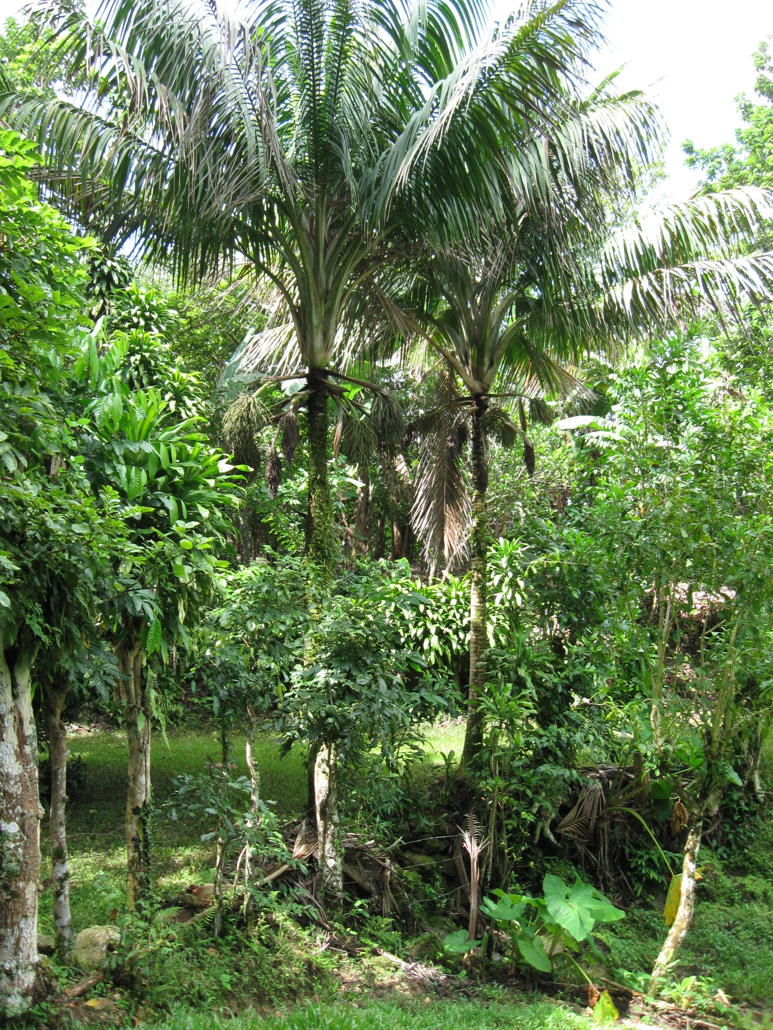 Scientific name: Calyptoronoma rivalis